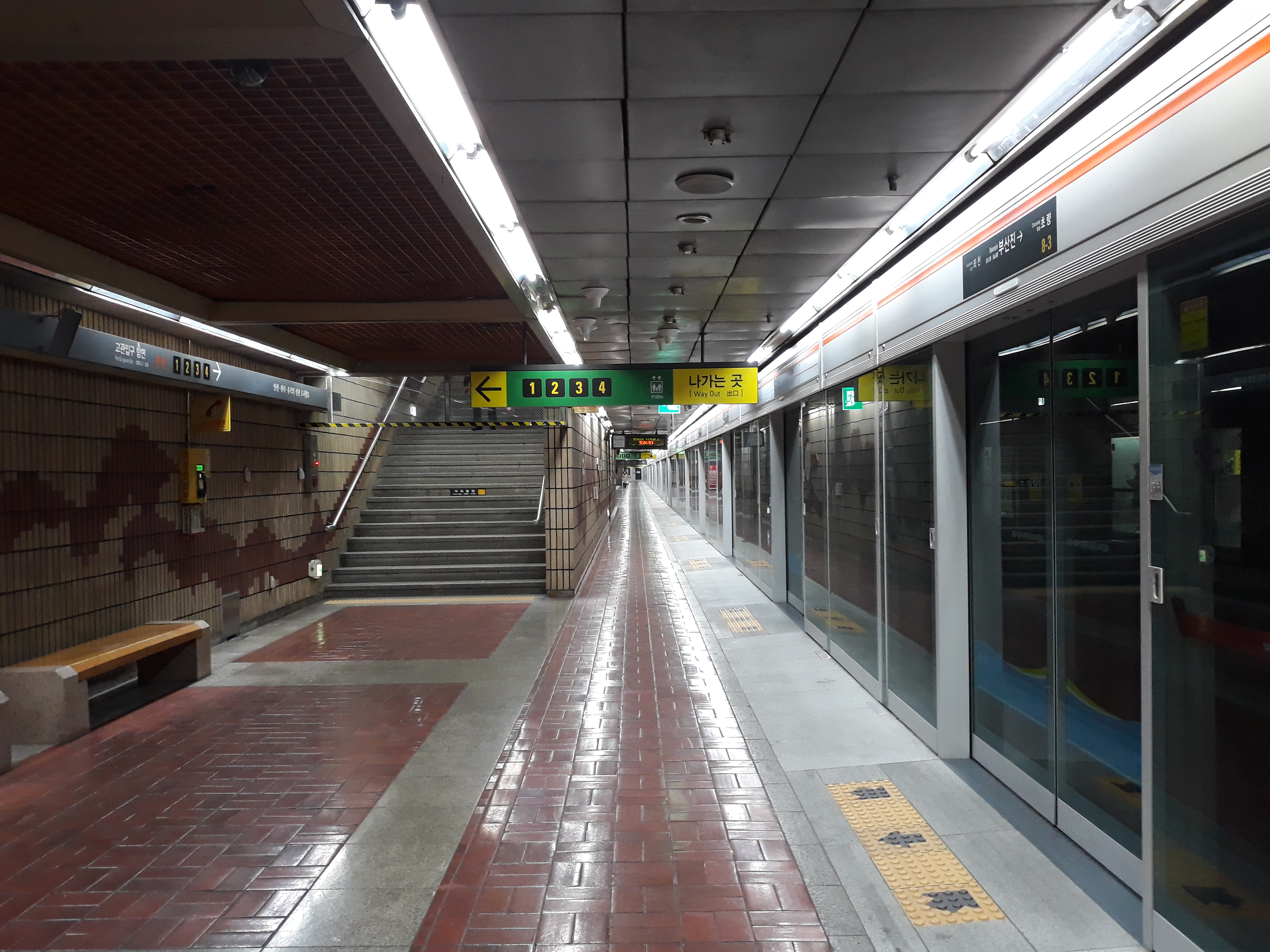 부산 도시철도 1호선 부산진역 다대포해수욕장 방면 승강장